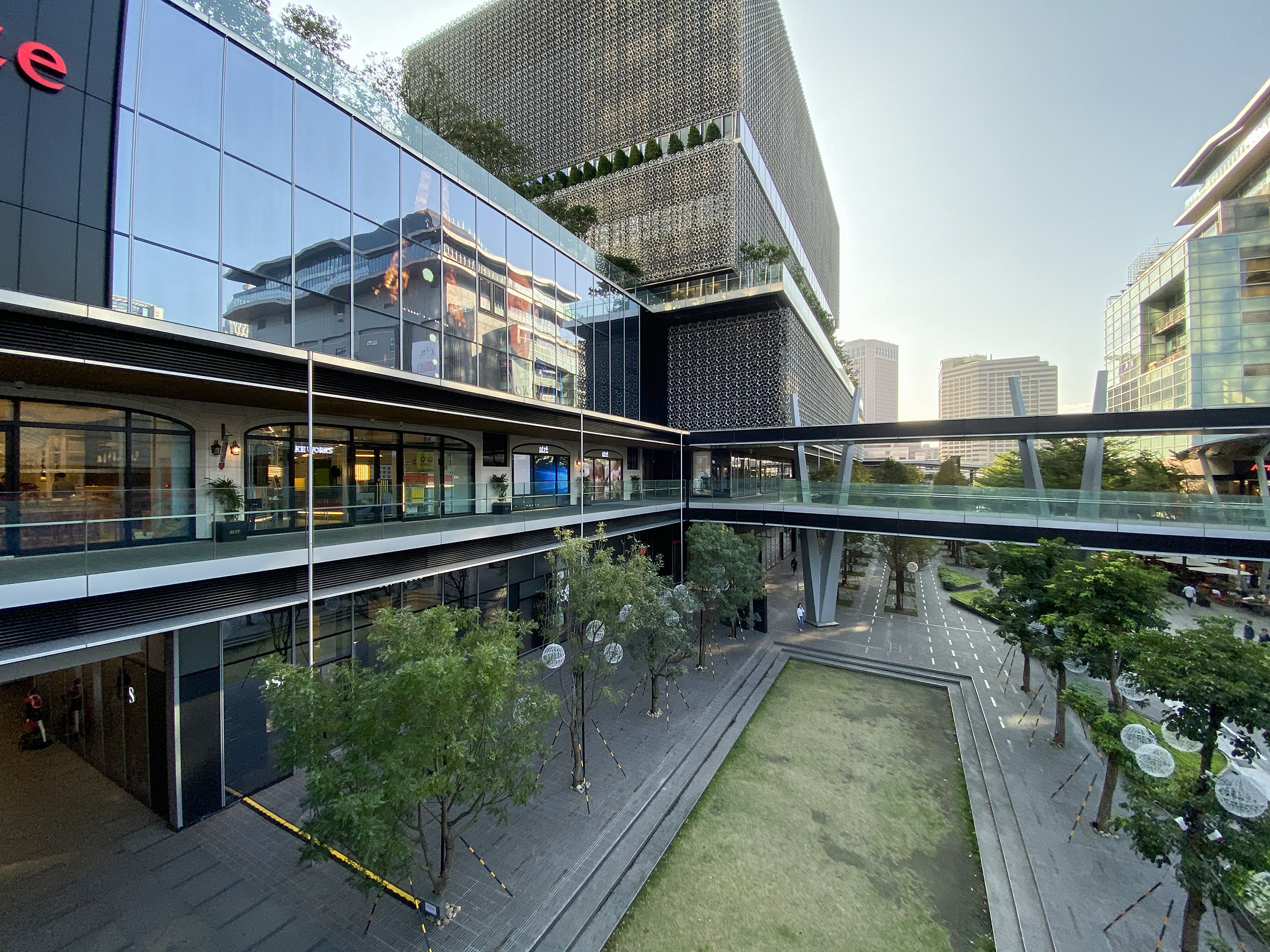 Breeze NAN SHAN arte